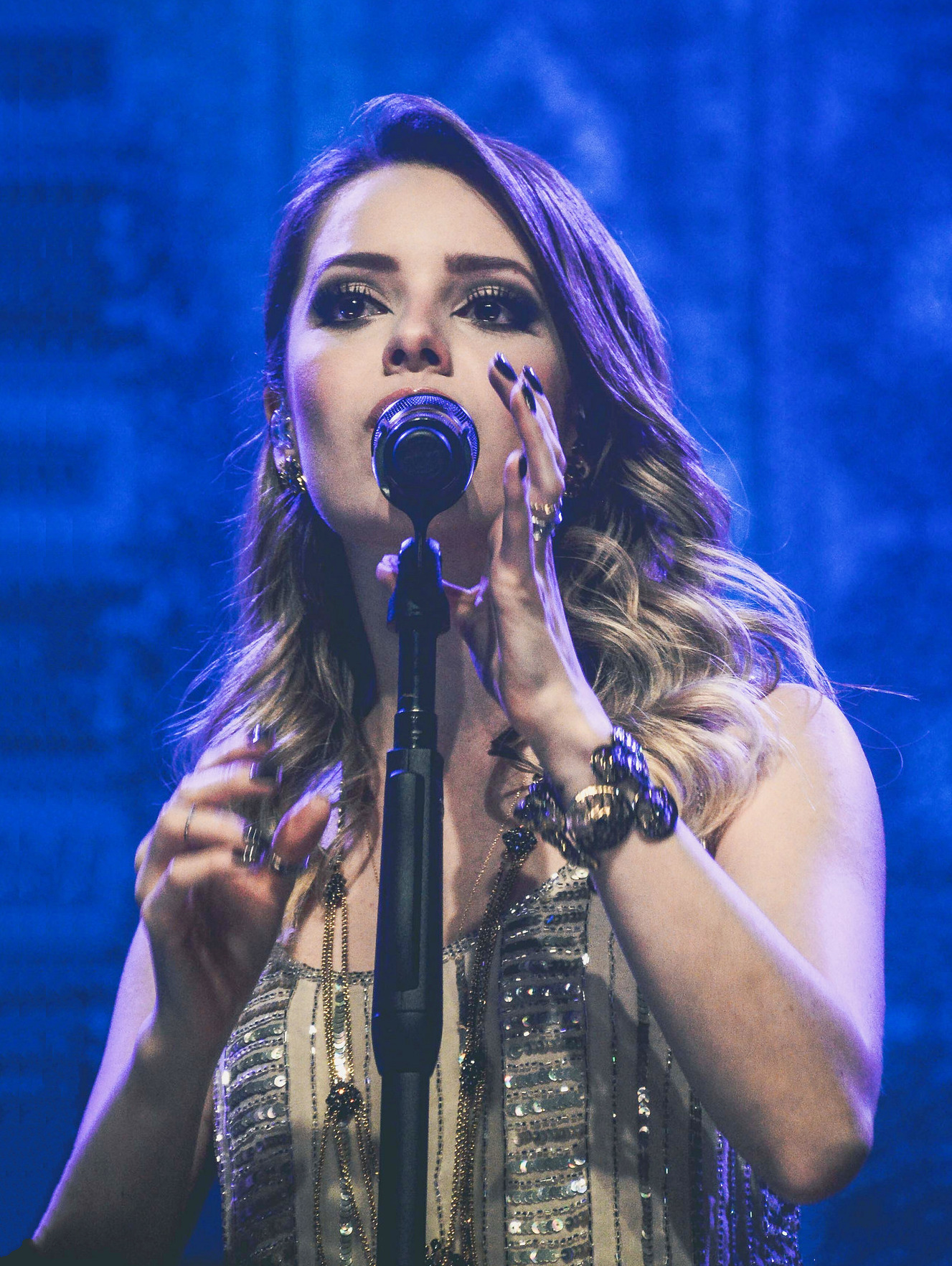 Sandy em São Paulo, Turnê Teaser 10/10/2015 Autora: Teca Lamboglia